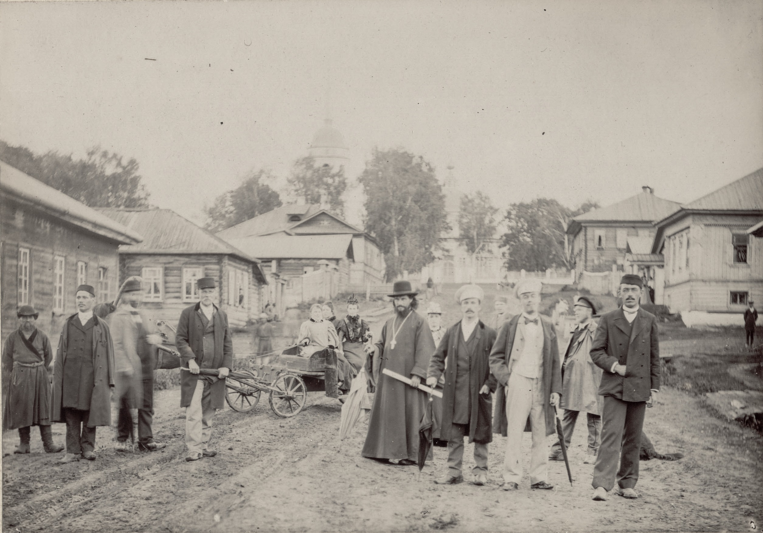 Главная улица с. Кудымкар. И.Я. Кривощеков – 4-й слева. 1897 г.